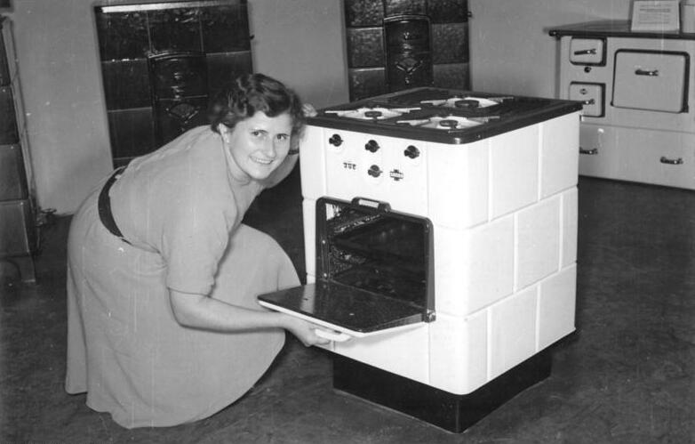 Zentralbild Klein 1.9.1953 Leipziger Messe 1953 31. August 1953 UBz: Im Handelshof zeigt das VEB Gasgerätewerk Dessau einen Kachelgasherd mit drei Kochstellen und einem Brat- und Backraum. Durch Einsatz von Ofenkacheln erfolgt eine Stahlblecheinspannung von 56 Tonnen im Jahr.